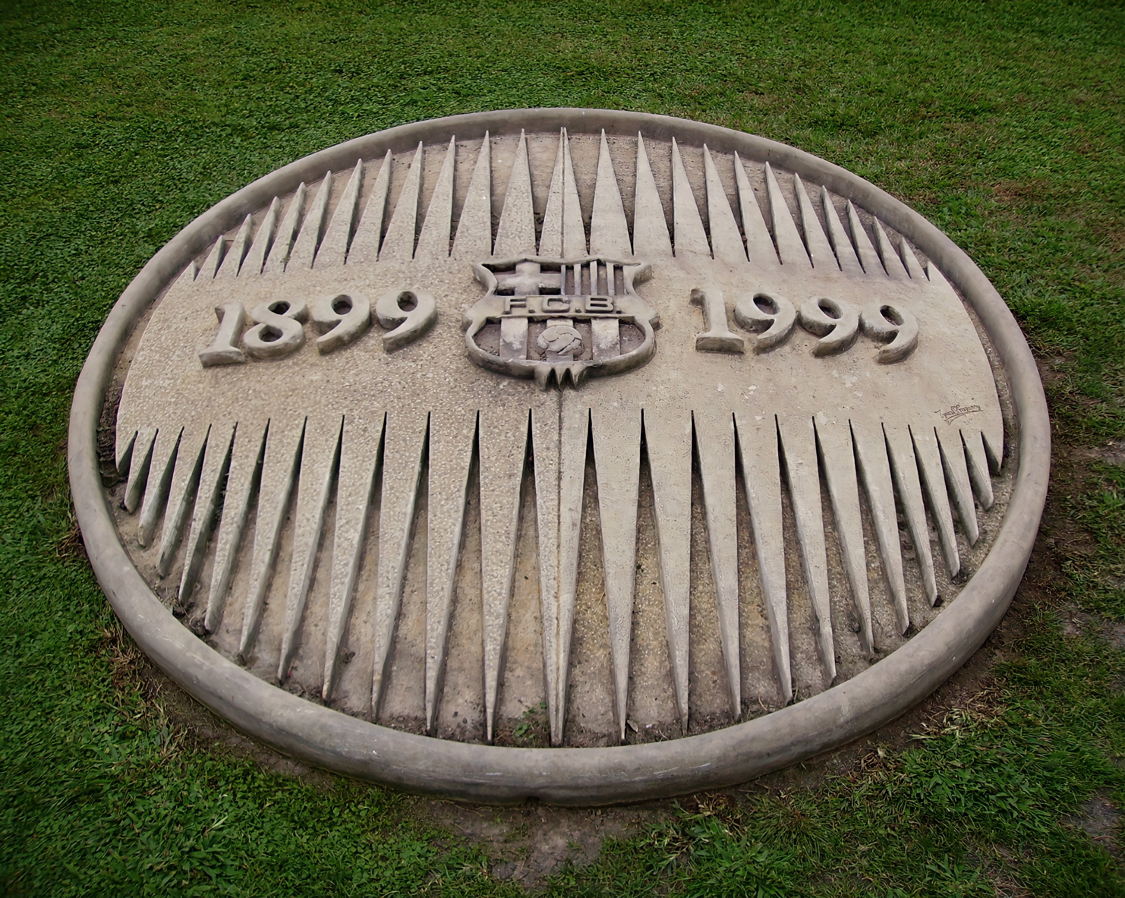 Logotip del Centenari, al Camp Nou.